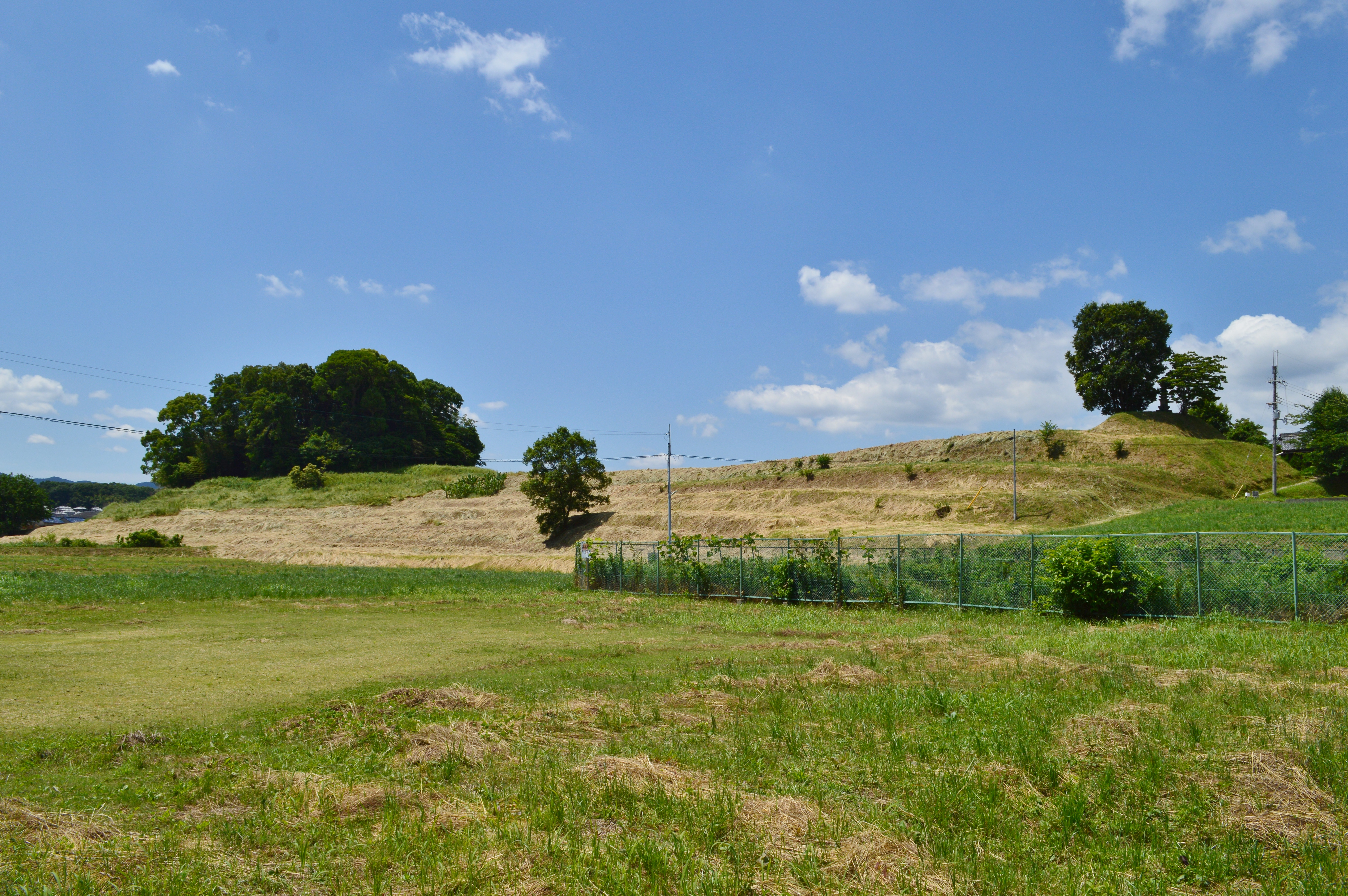 丸山古墳 (橿原市) 墳丘全景